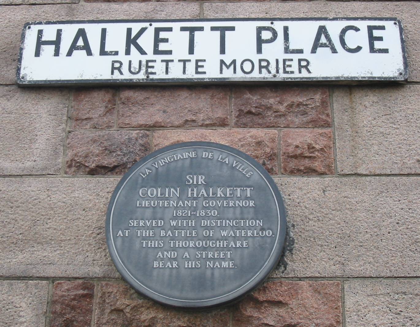 La Ruette Morier, Saint Hélyi